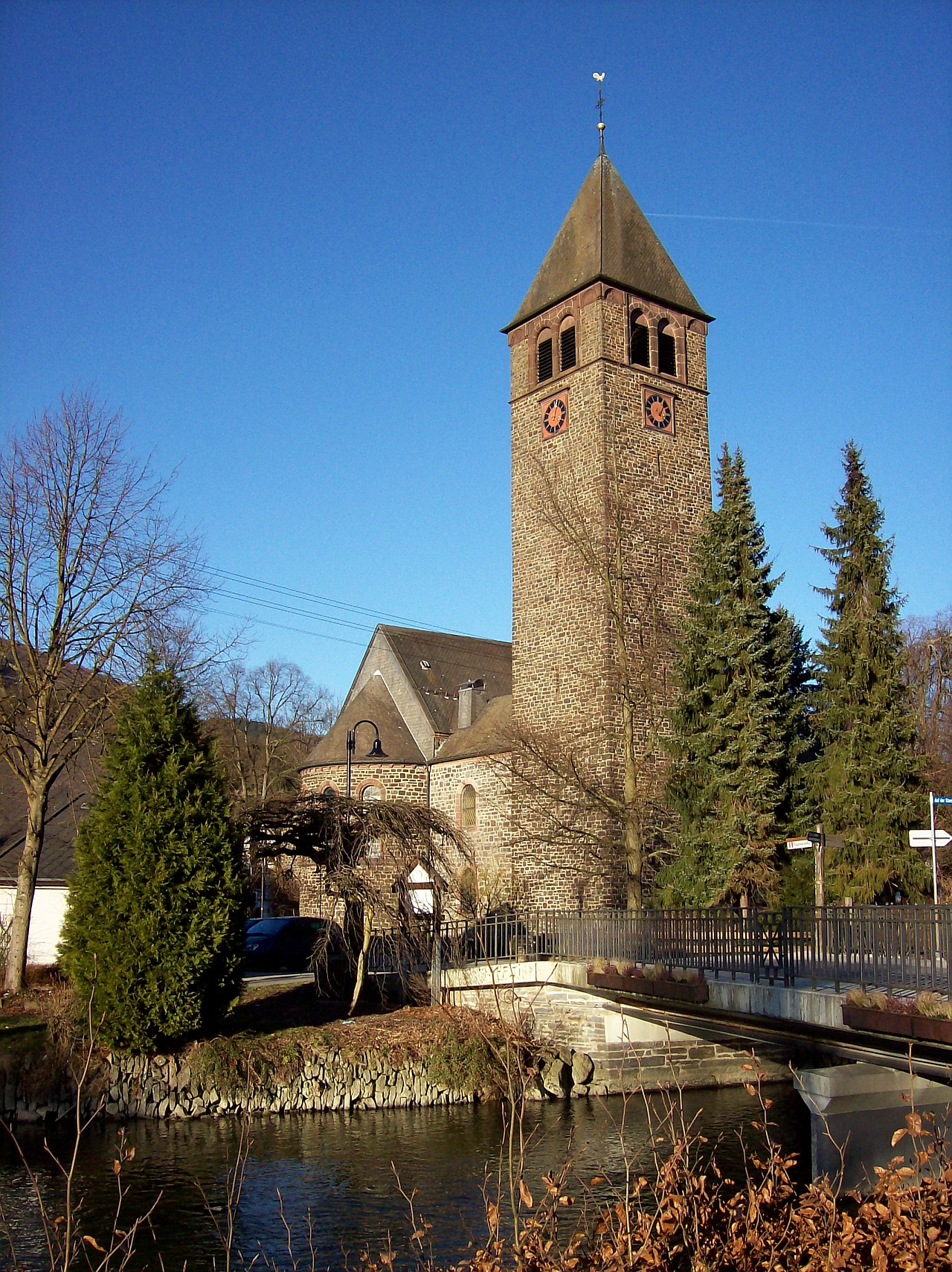 Pfarrkirche neben der Lenne in Lennestadt-Saalhausen (Germany), Architekt Prof. Joseph Buchkremer